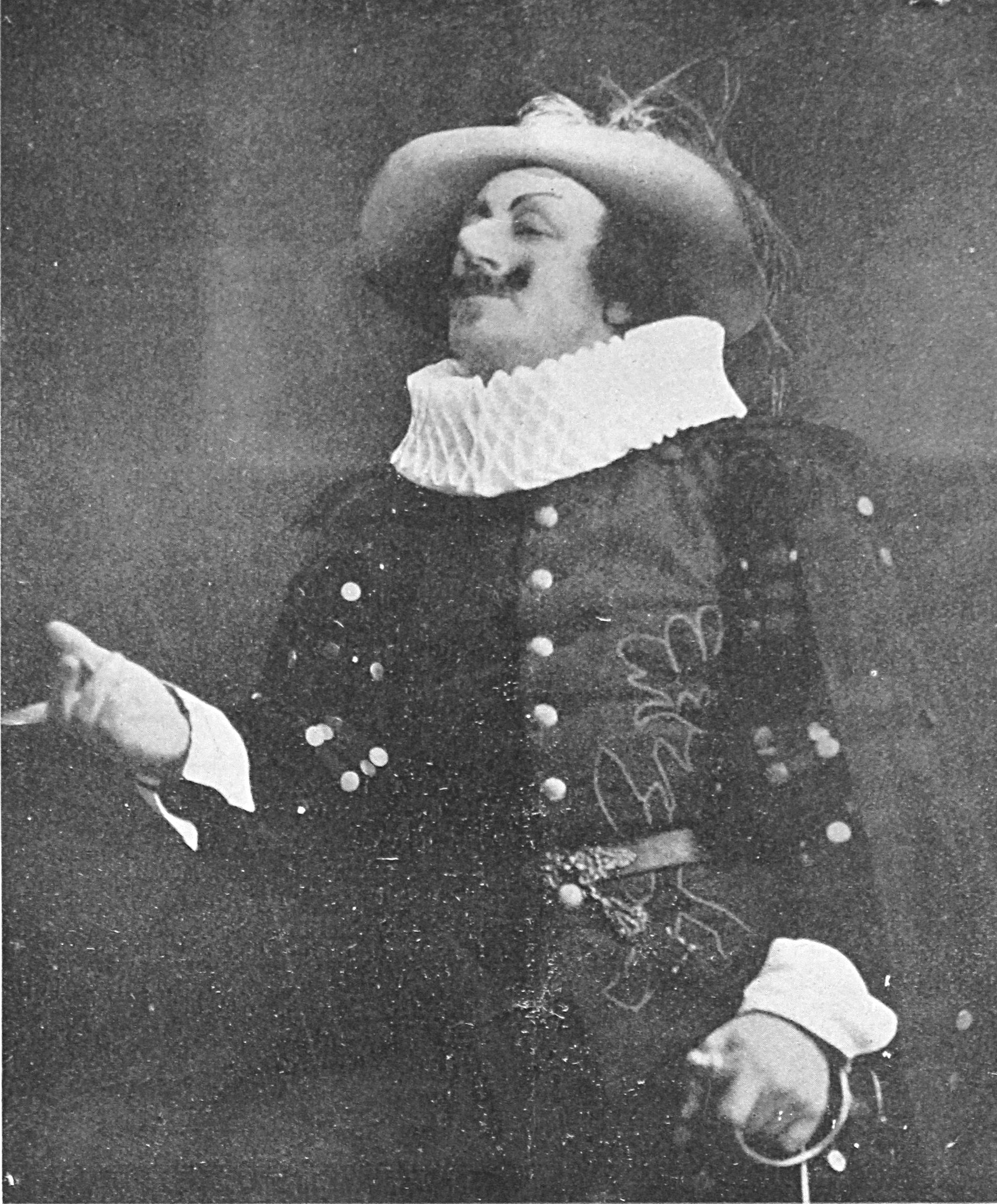 Ivan Hedqvist som Cyrano de Bergerac i Edmond Rostands pjäs med samma namn på Dramaten 1917.